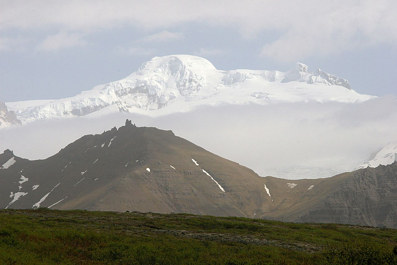 Island, dag 2. Skaftafell National Park. Hvannadalshnúkur, Islands högsta fjäll (2110 m)